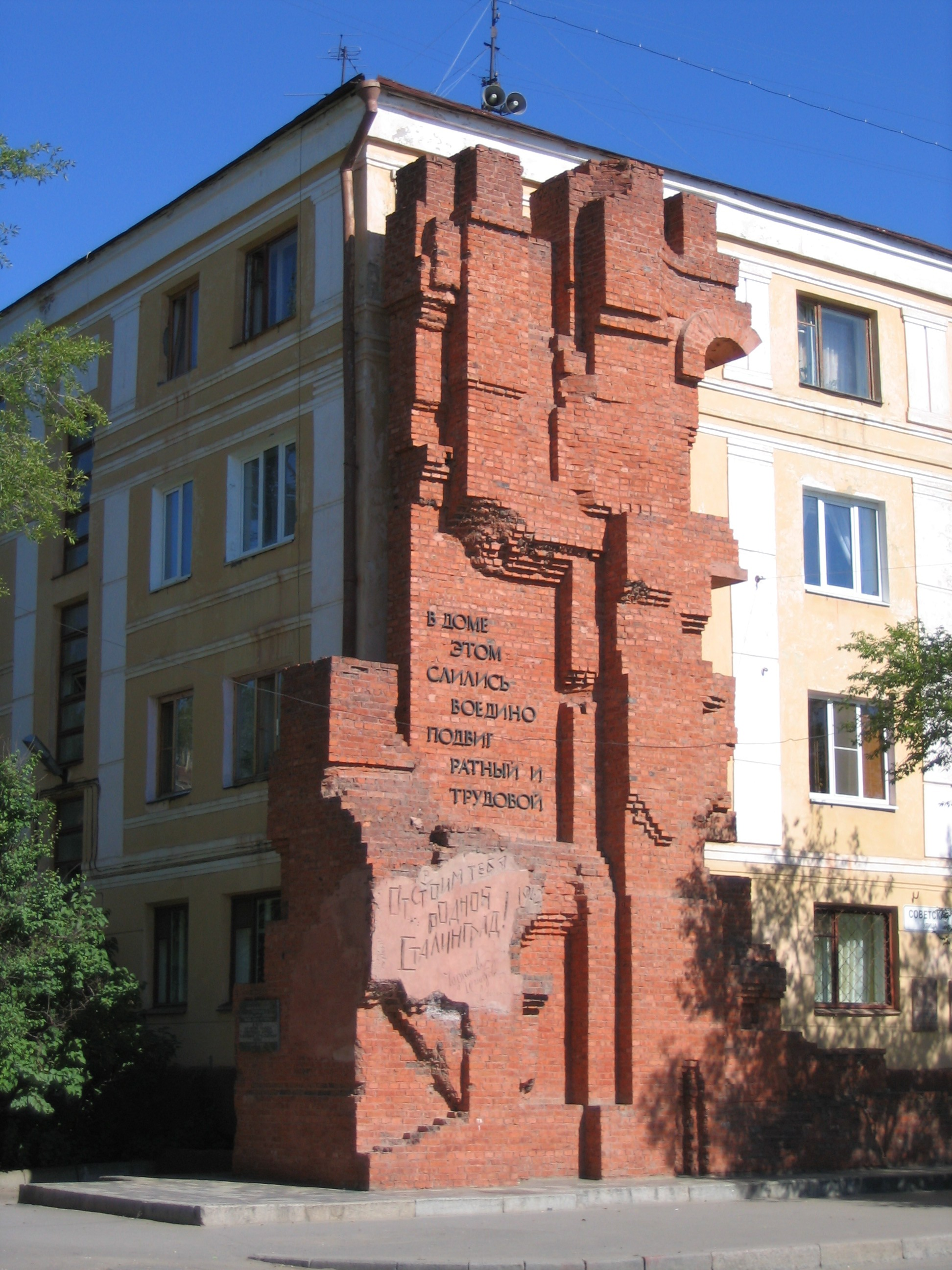 Dom Pavlova (Pavlov's House) in Volgograd, Russia